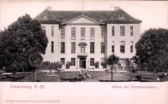 Ordensschloss Sonnenburg. Deutsche Postkarte mit dem Ordensschloss des Johanniterorden in Sonnenburg/Neumark.